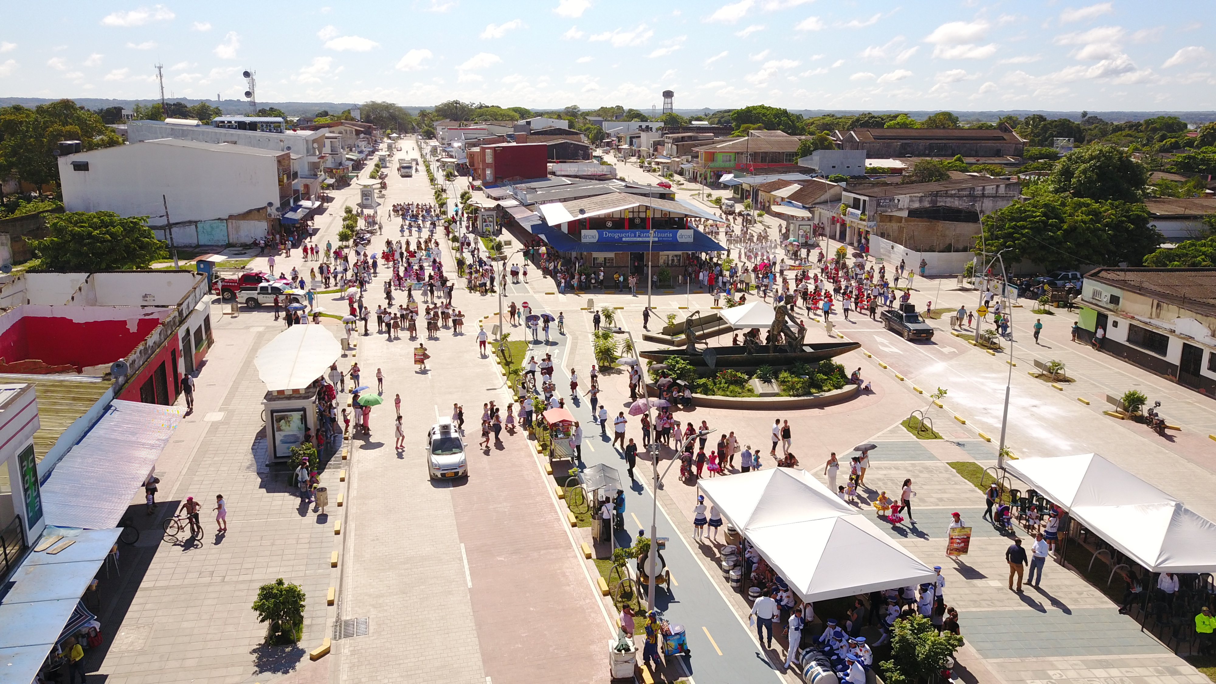 Parque el canoero- Día inauguración Renovación Calles 5 y 6 Centro Fundacional de Puerto López-Meta